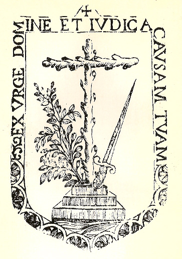 Escut de la Inquisició en gravat sobre fusta, Impremta Guasp, Mallorca s. XVII